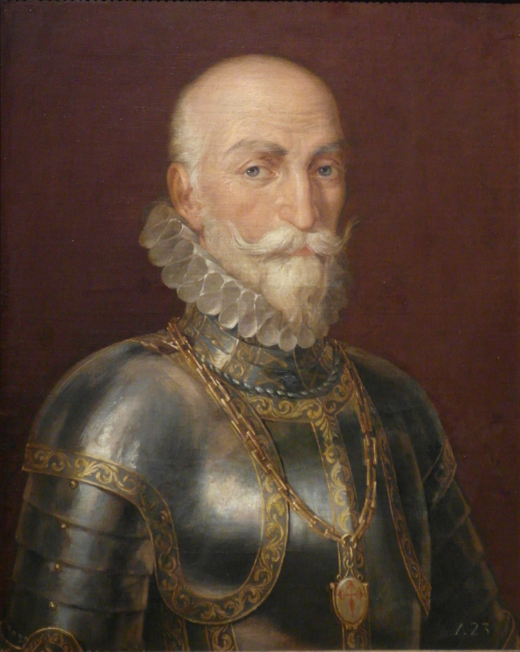 Retrato del aristócrata y marino español Álvaro de Bazán (1526–1588).